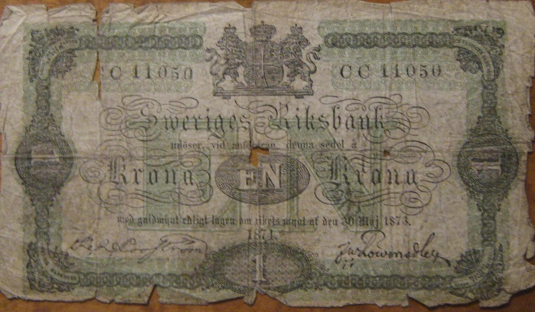 Kotia från 1874